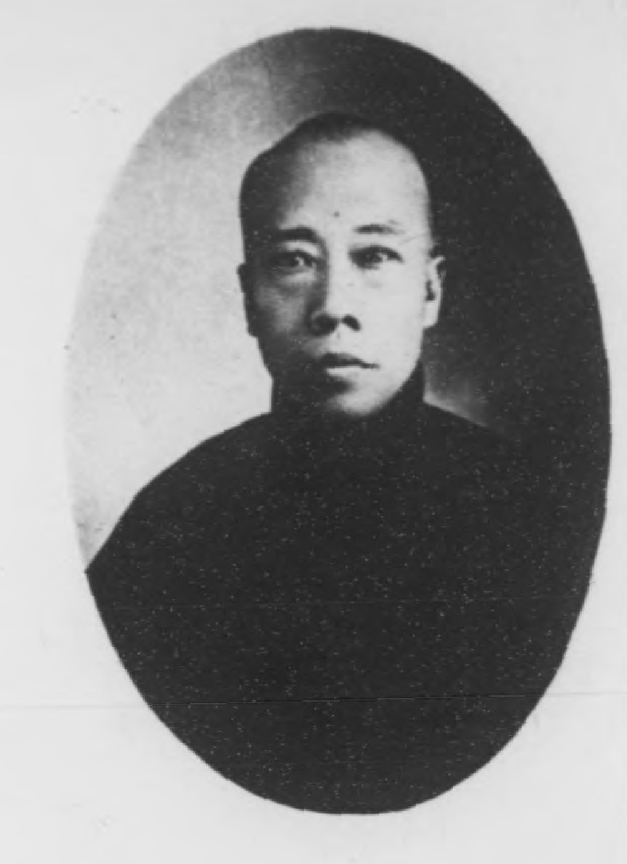 光緒甲辰科進士小像